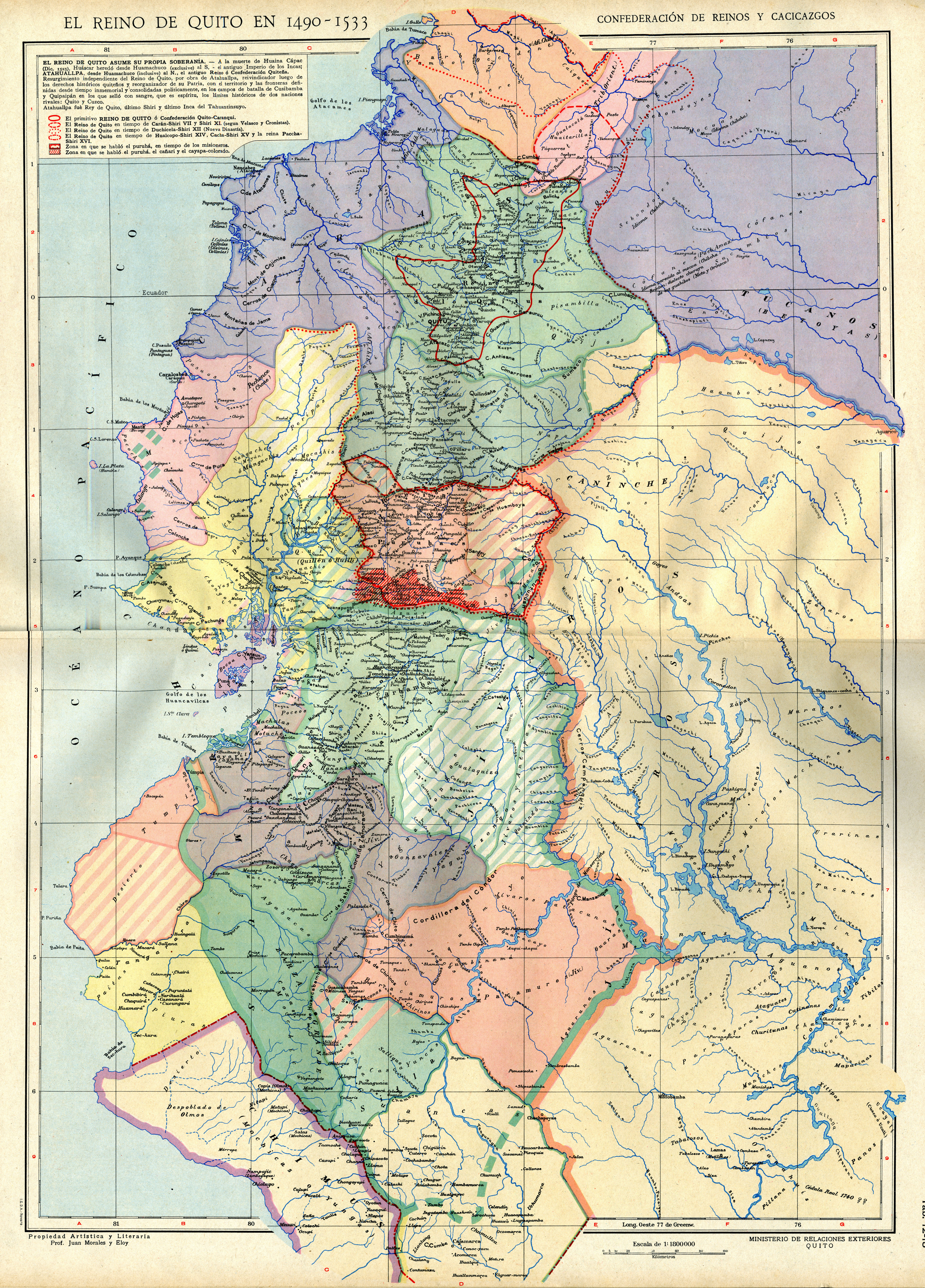 Mapa Hipótetico del Reino de Quito, según las referencias escritas de Juan de Velasco, siendo un gráfico interpretativo sobre el Reino de Quito que ideó para su obra, aunque su aseveración denomina asimismo la vertiente de lo geográfico con lo historicista, es decir provee del nombre como denominación oficial a partir de la conceptualización castellana de Reino Indiano.Diapositiva de Consulta y acceso publico cuya información fue investigada de un libro y/o ejemplar de revisión custodiado en los Fondos Bibliográficos y Cartográfico (Sección Siglo XV o Etapa Precolombina) del Archivo Histórico del Guayas; Guayaquil, Ecuador.Consultado y compartido por el usuario J. Javier García A.